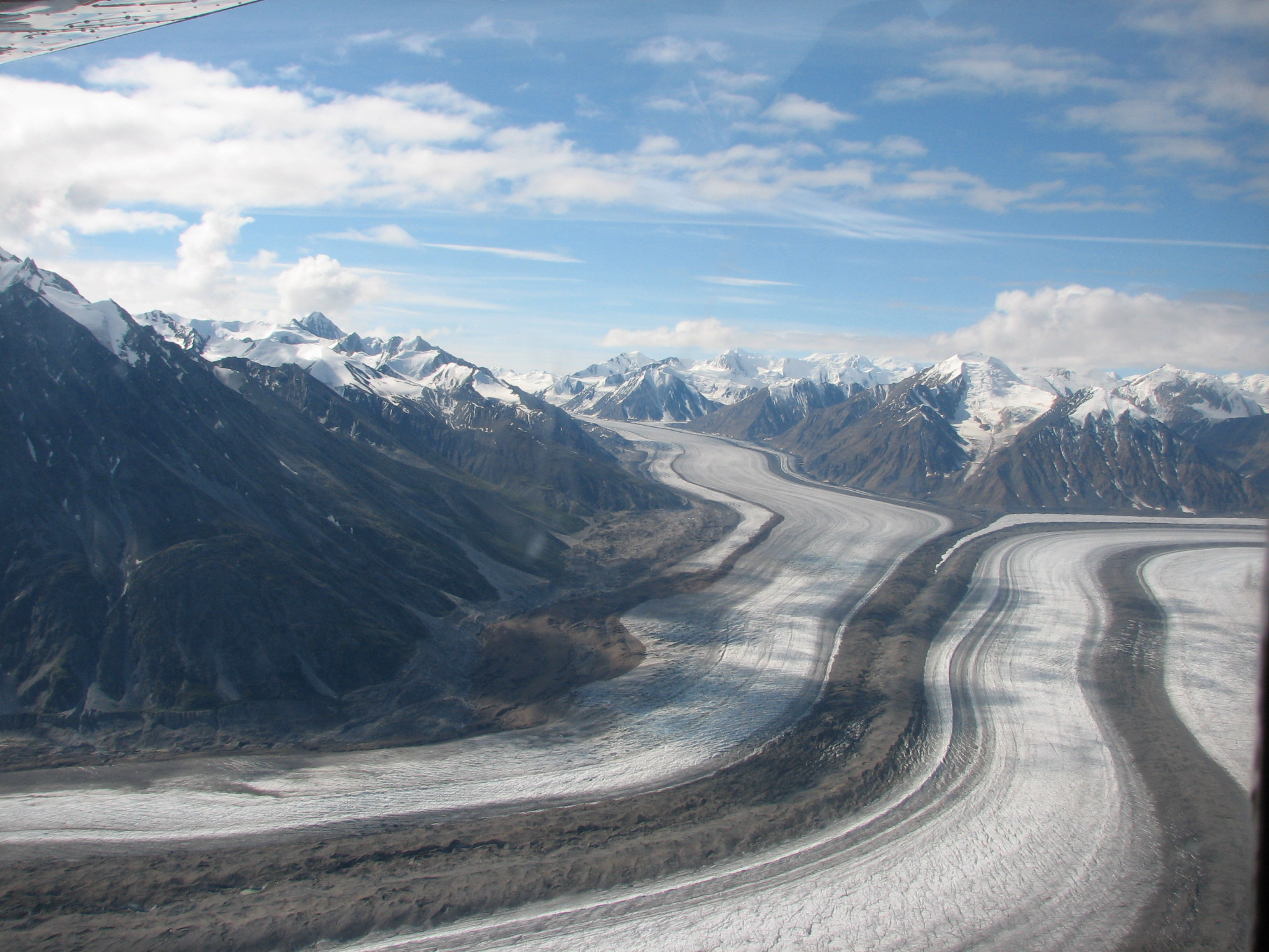 Kaskawulsh-Gletscher, links der South Arm